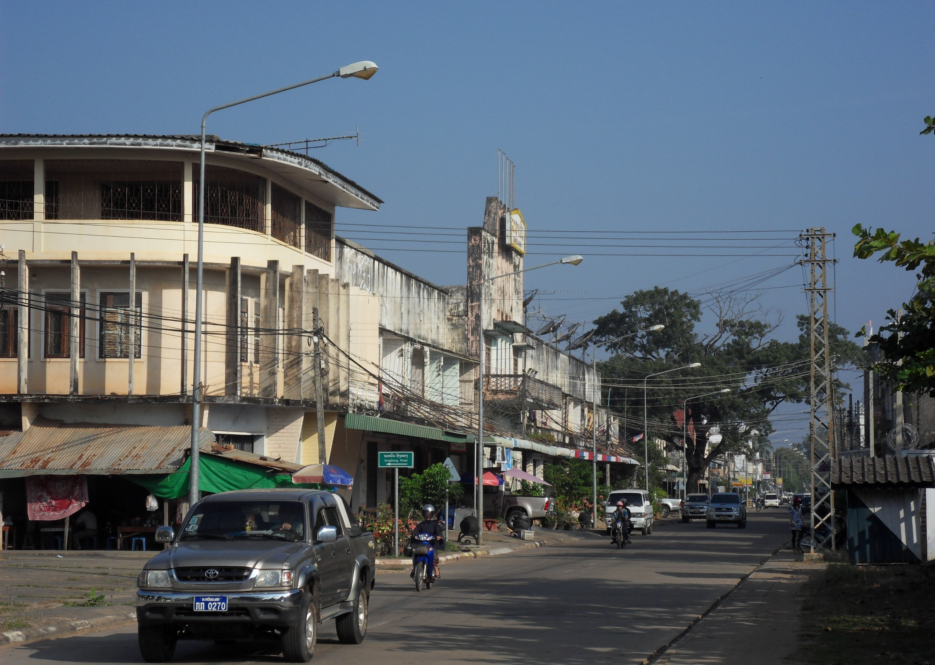 Une rue de Savannakhet en nov. 2011.